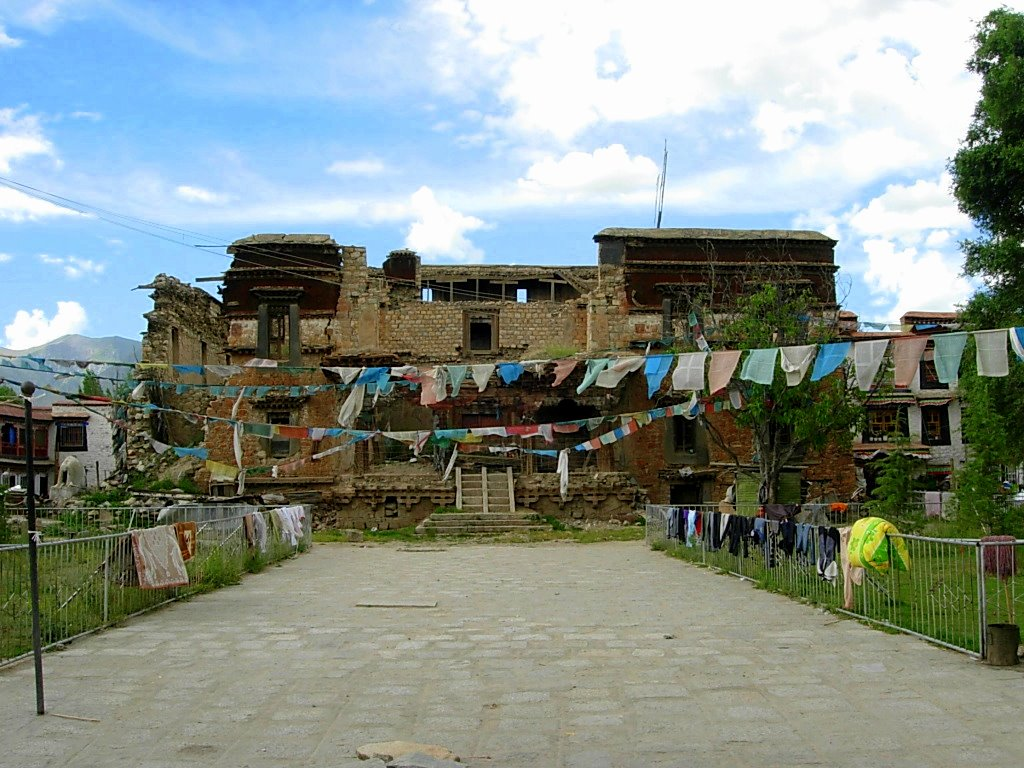 拉萨席德寺废墟